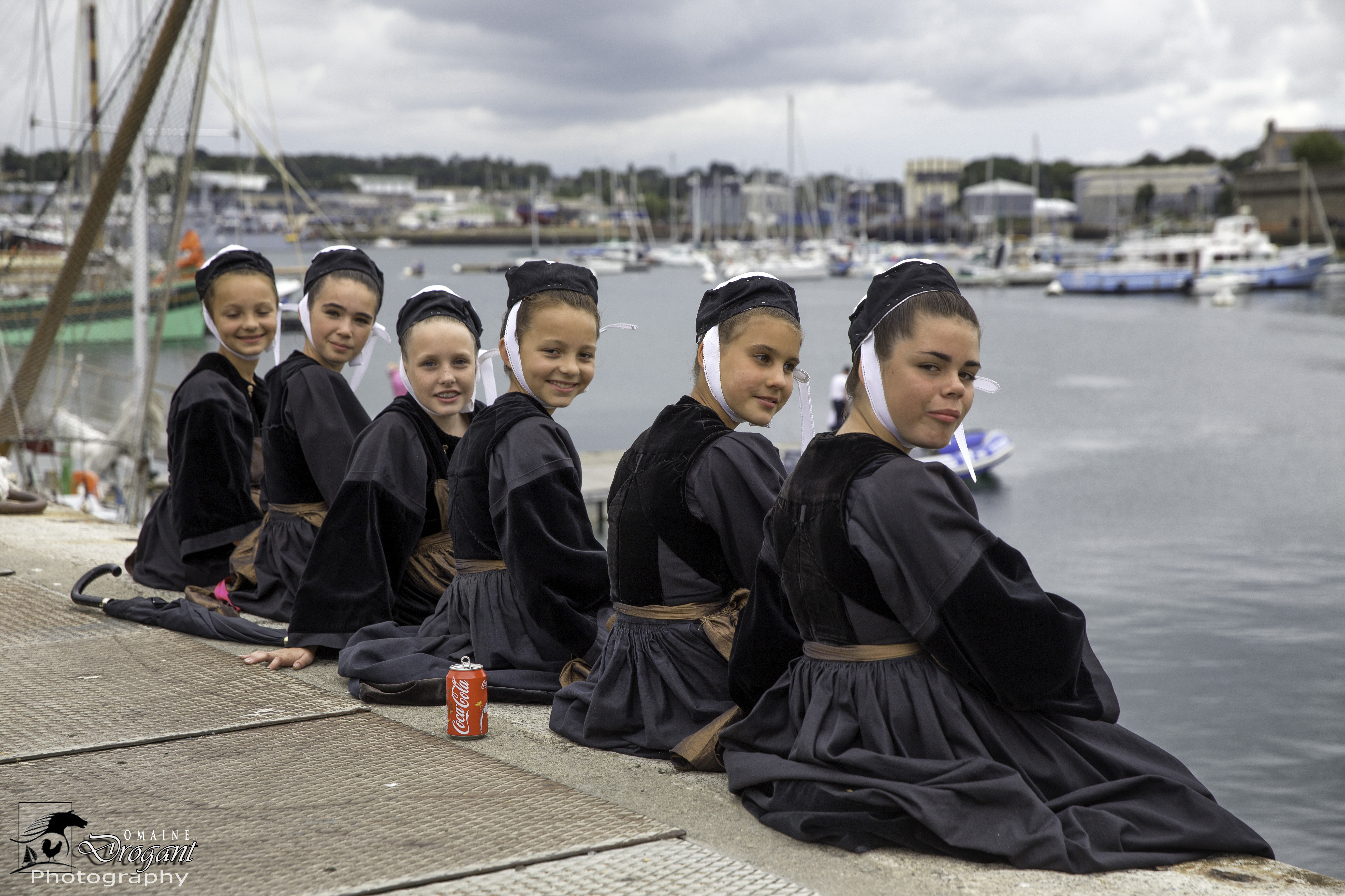 Les filets bleus à Concarneau, jeunes filles en costume breton au bord de l'eau.